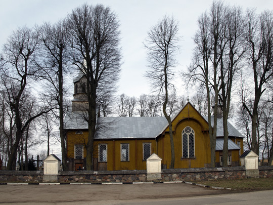 Raudėnų Šv. apaštalo Baltramiejaus bažnyčia